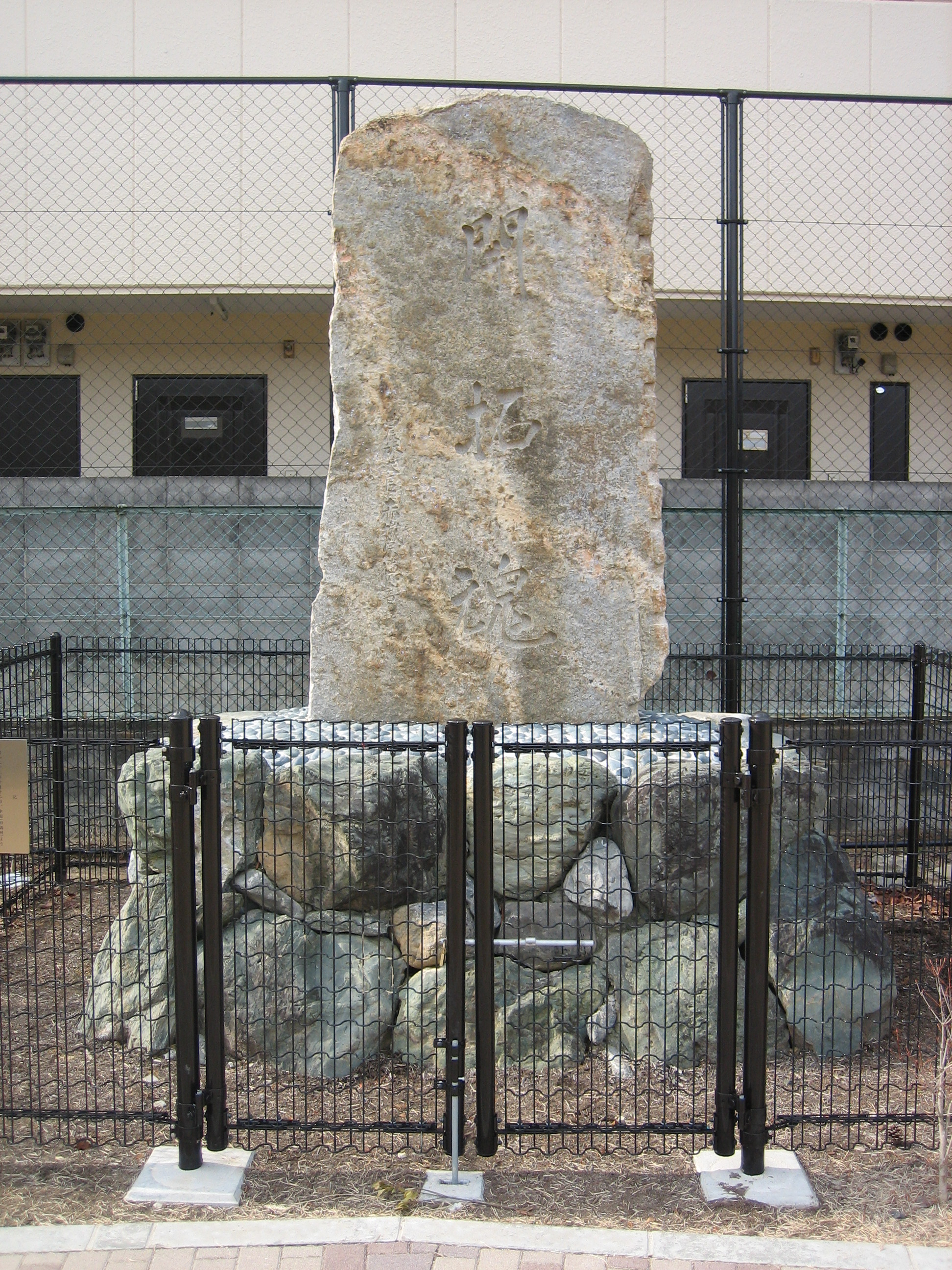 京都市北区大北山原谷乾町から開拓記念碑「開拓魂」を撮影